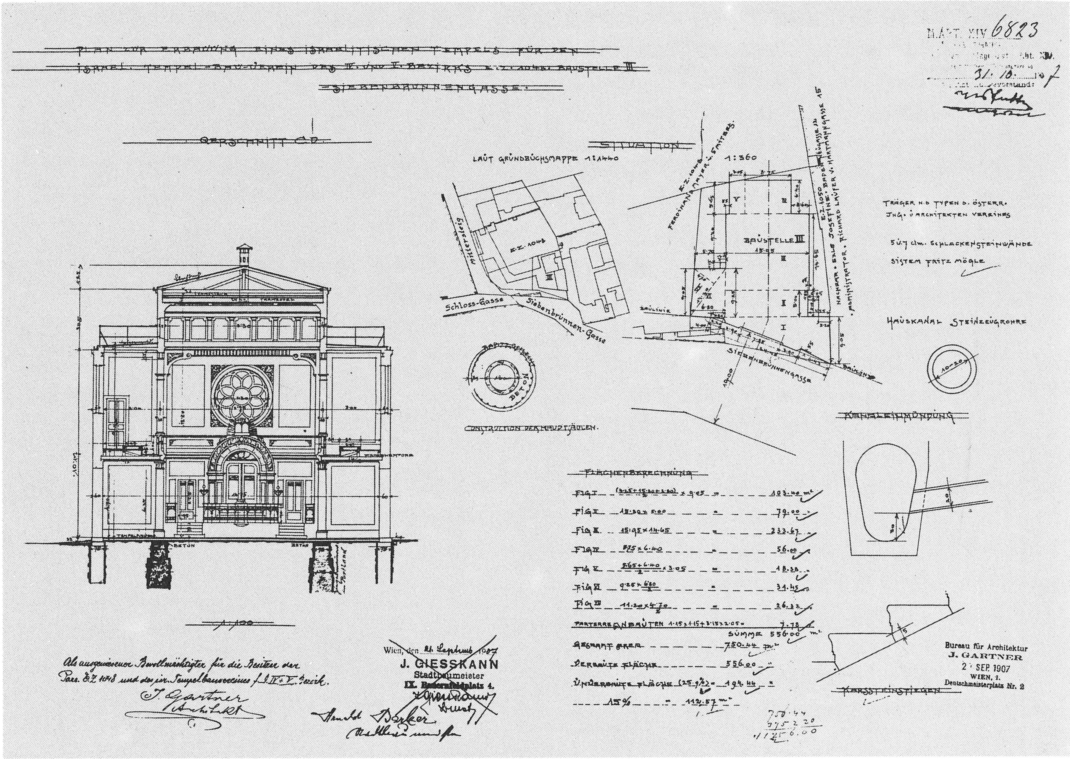 Die Synagogue in der Siebenbrunnengasse, Querschnitt, Baupläne von Jakob Gartner.